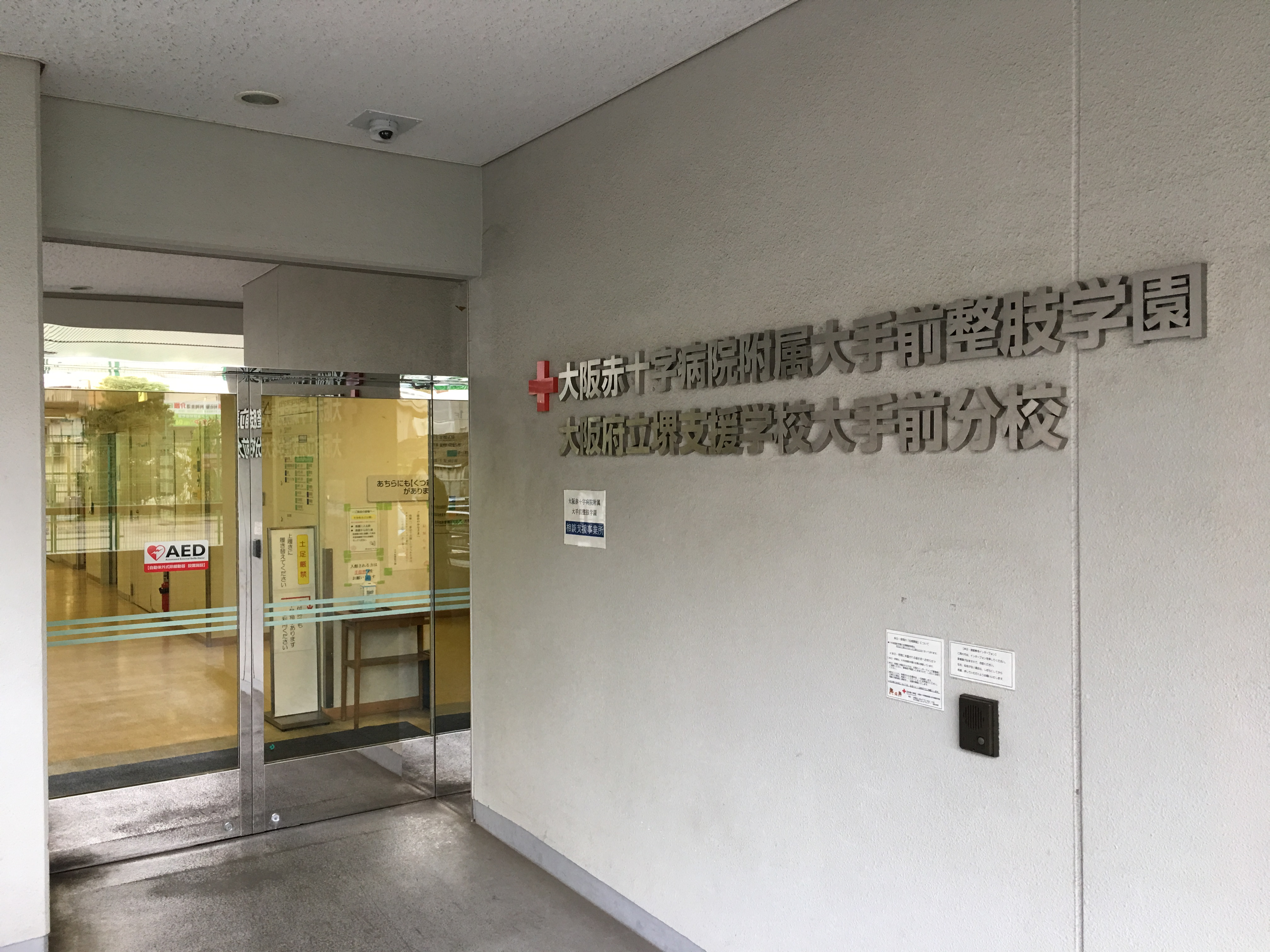 大阪府立堺支援学校大手前分校 入口